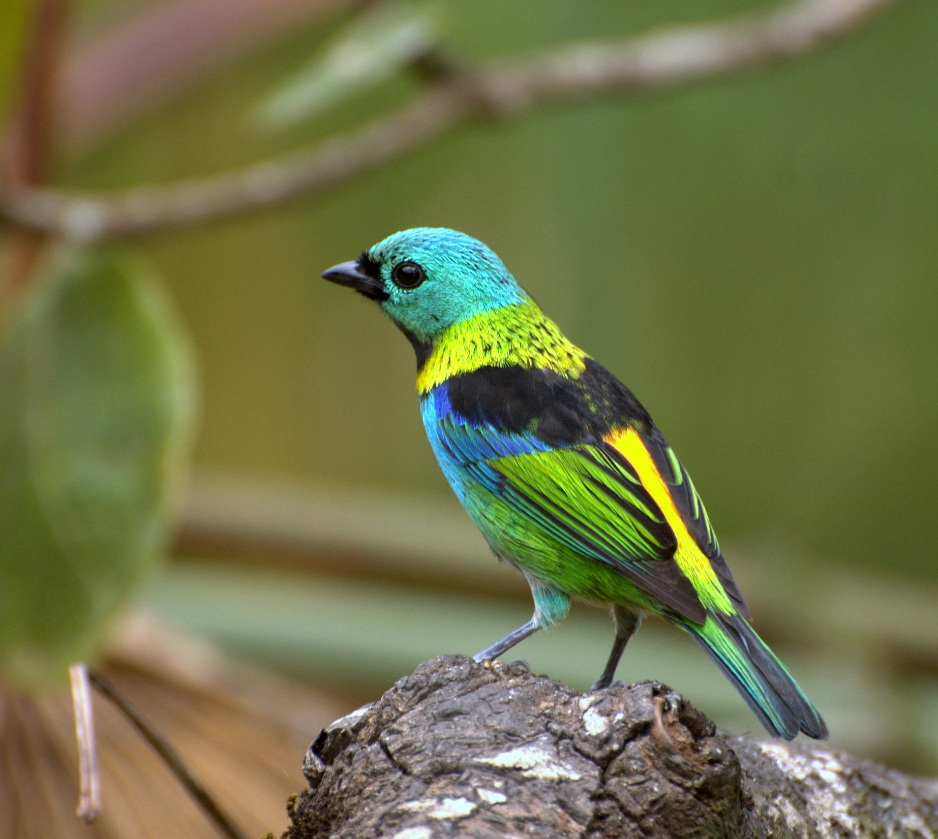 Folha Seca - Ubatuba-SP -Brasil